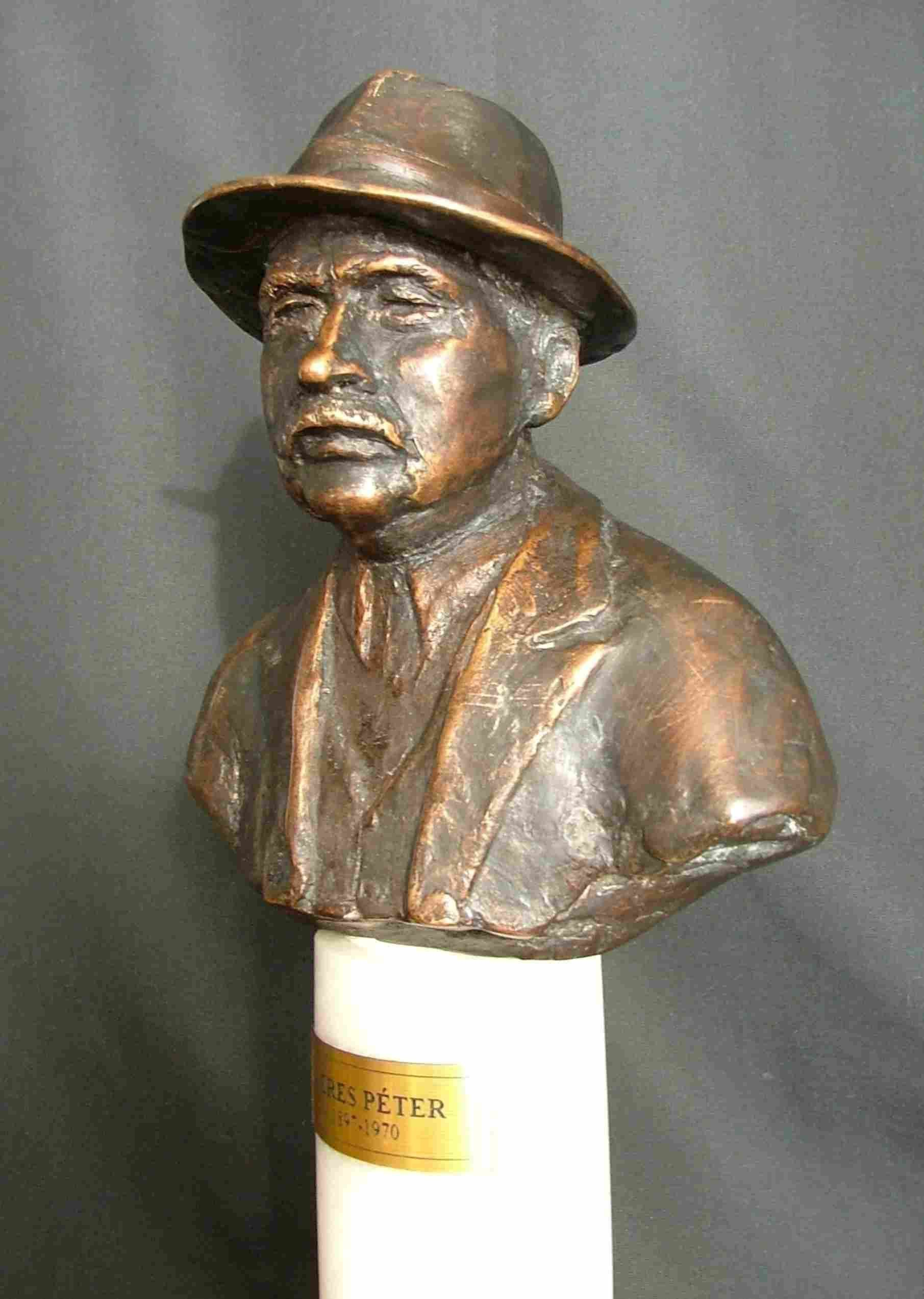 Juha Richárd: Veres Péter (bronz kisplasztika)